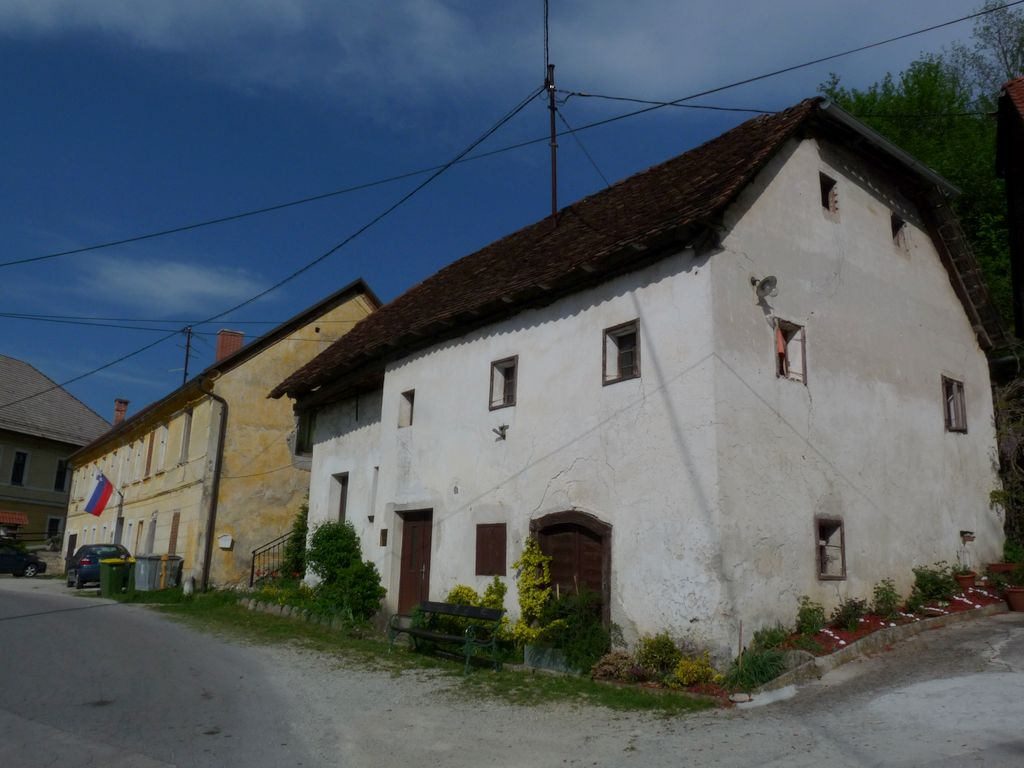 Rojstna hiša Janeza Čandka